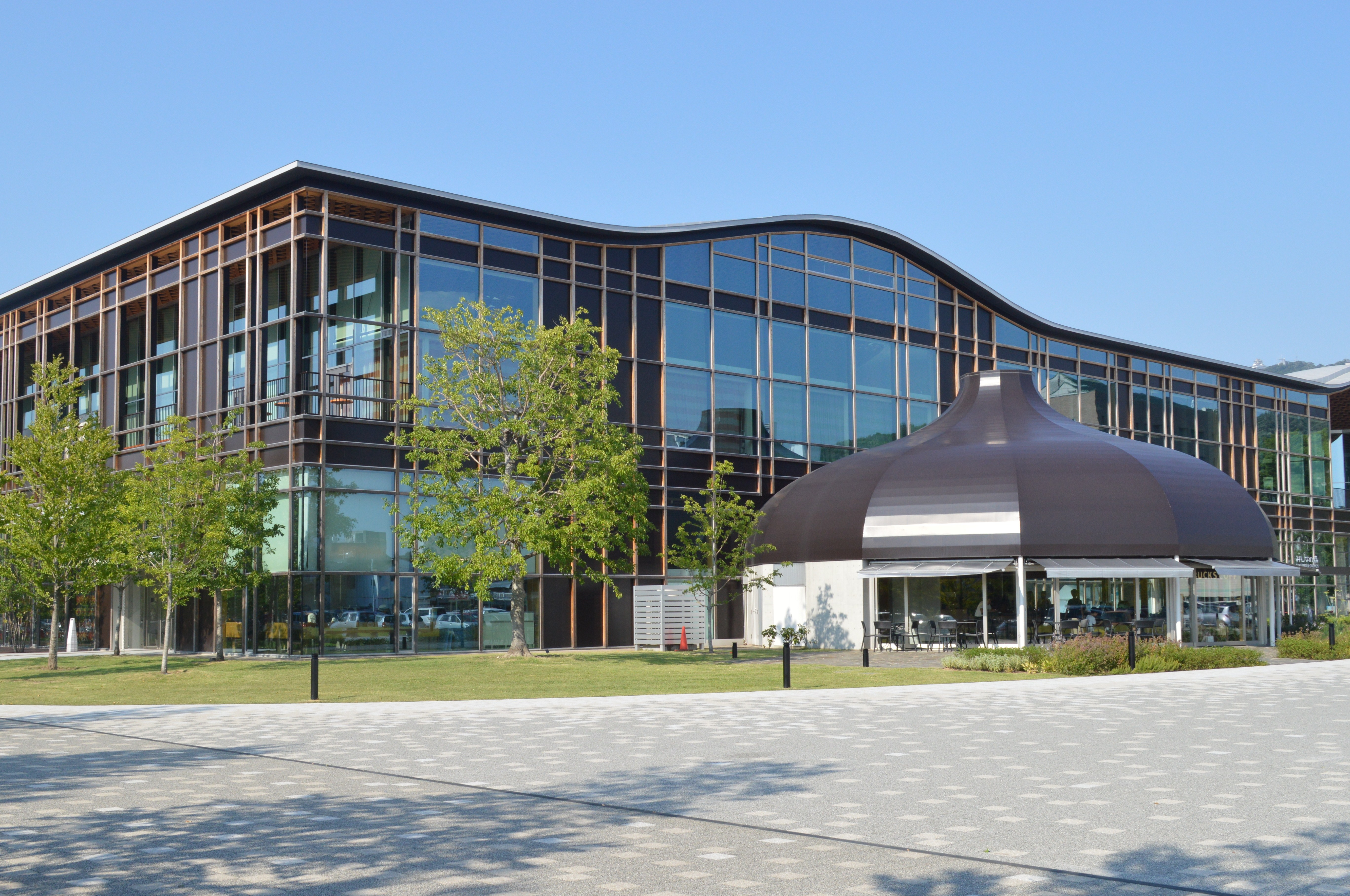 みんなの森 ぎふメディアコスモス。